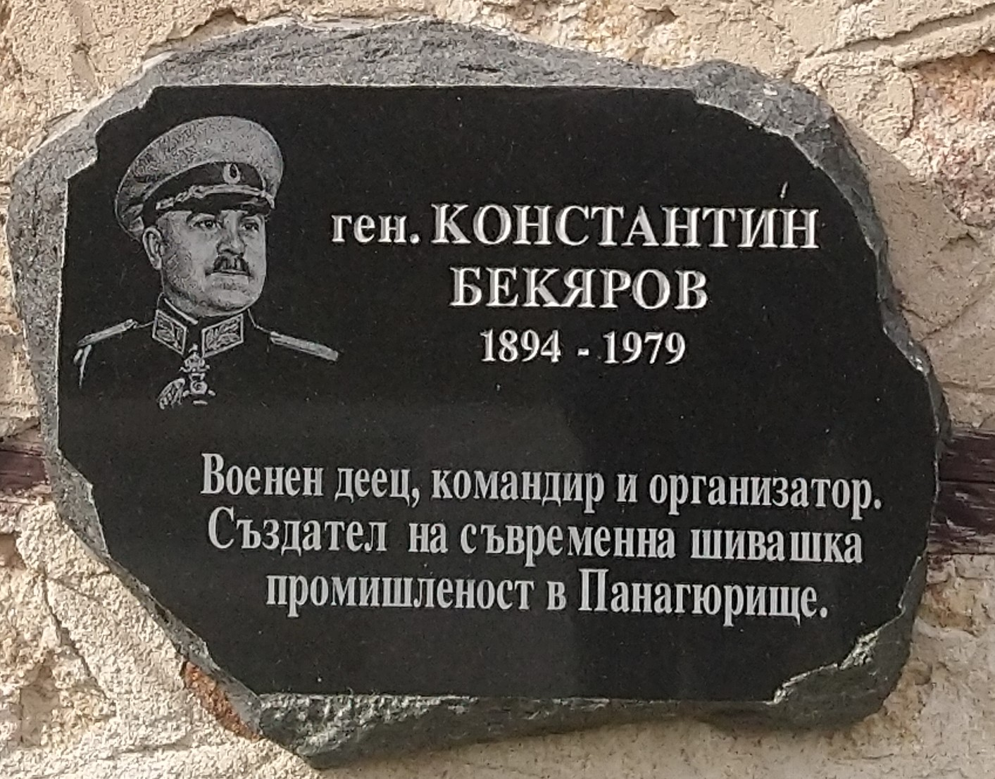 ген. Константин Бекяров (1894 - 1979) - плоча в Исторически музей Панагюрище - Надпис: Военен деец, командир и организатор. Създател на съвременна шивашка промишленост в Панагюрище.